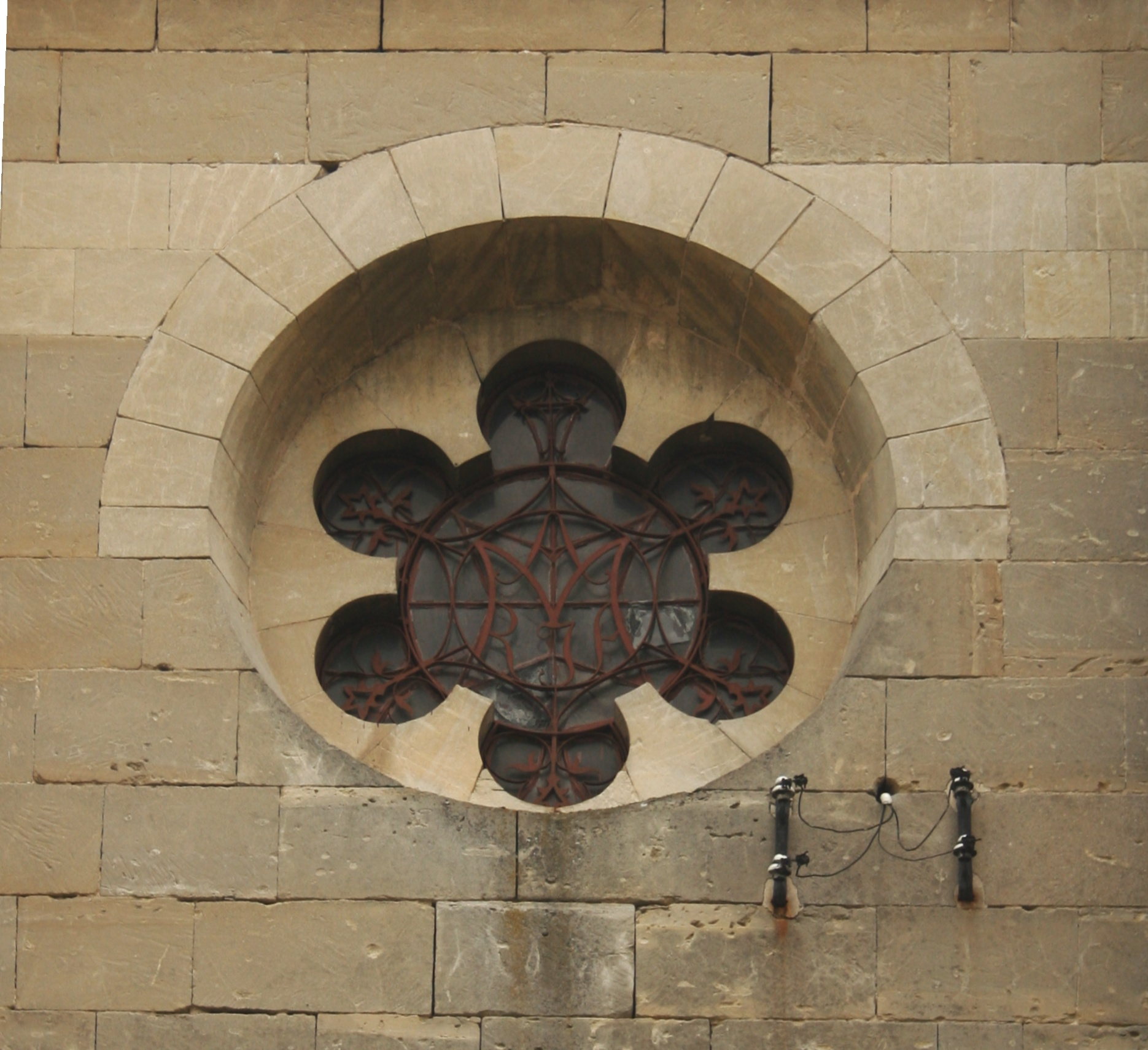 Działoszyce - rozeta kościoła św. Trójcy